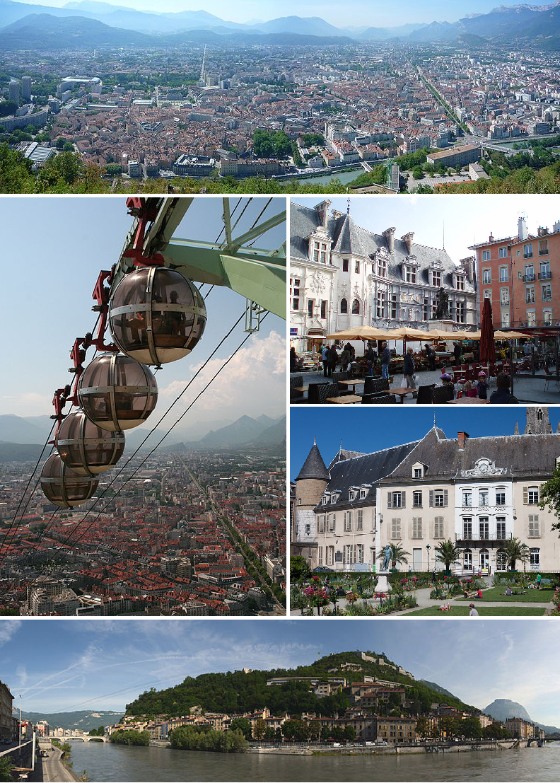 Panorama de Grenoble (Agglomération vue depuis la Bastille, Téléphérique de Grenoble, Place Saint-André, Hôtel de Lesdiguières depuis le Jardin de ville et la Bastille depuis les berges de l'Isère)